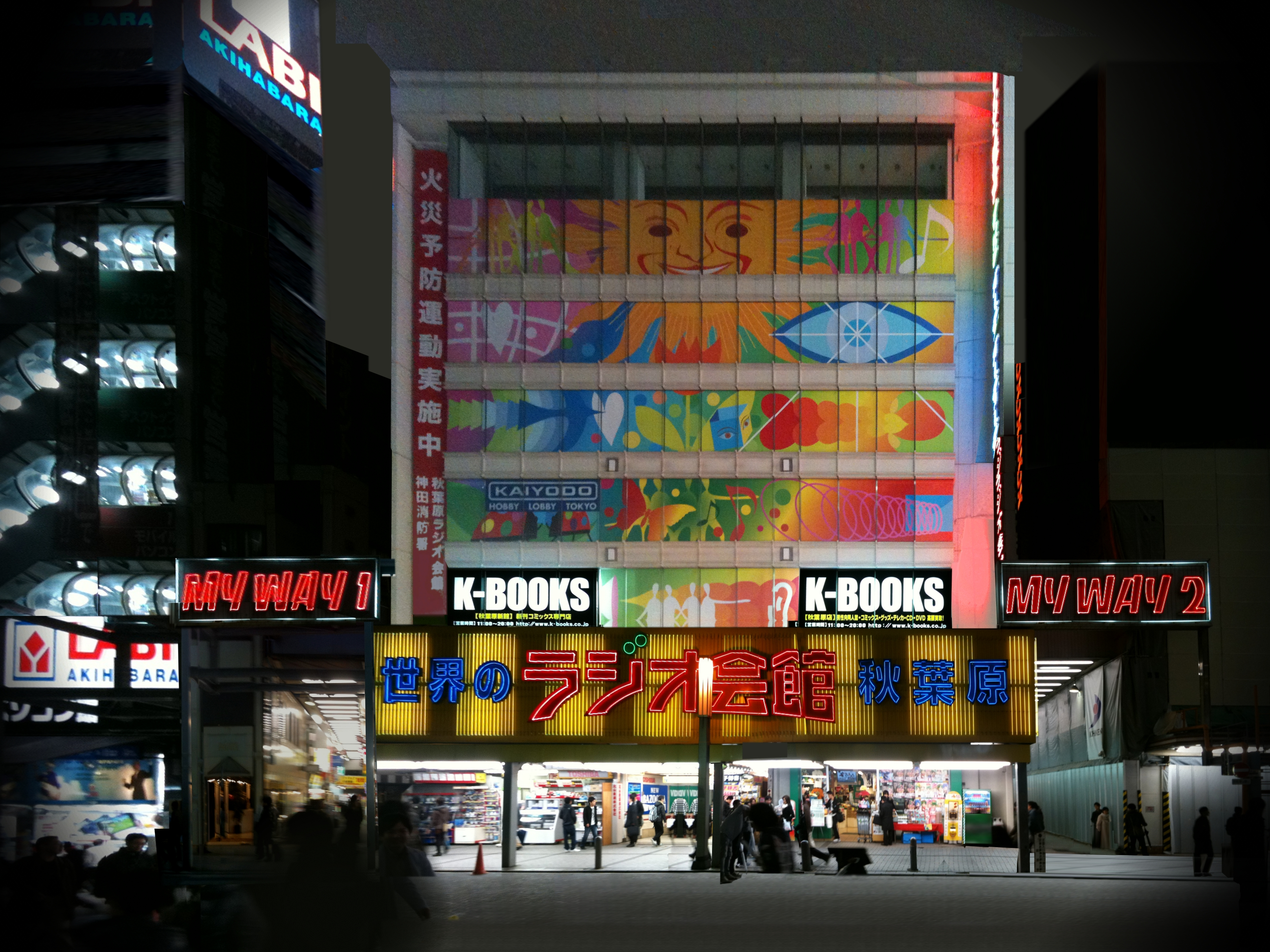 Akihabara Radio Kaikan, 6th March 2010Akihabara Radio Kaikan, 6th March 2010